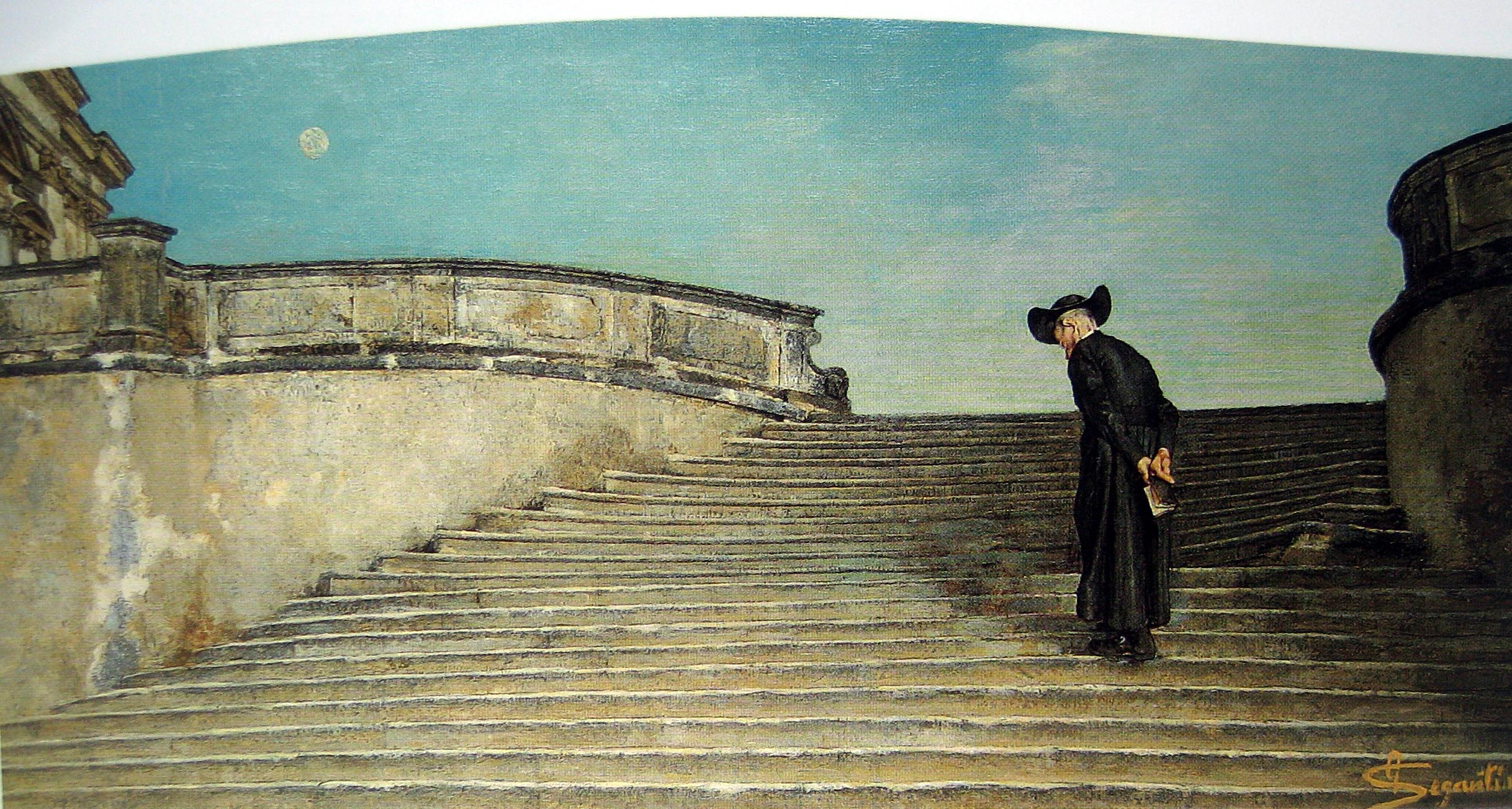 Frühmesse